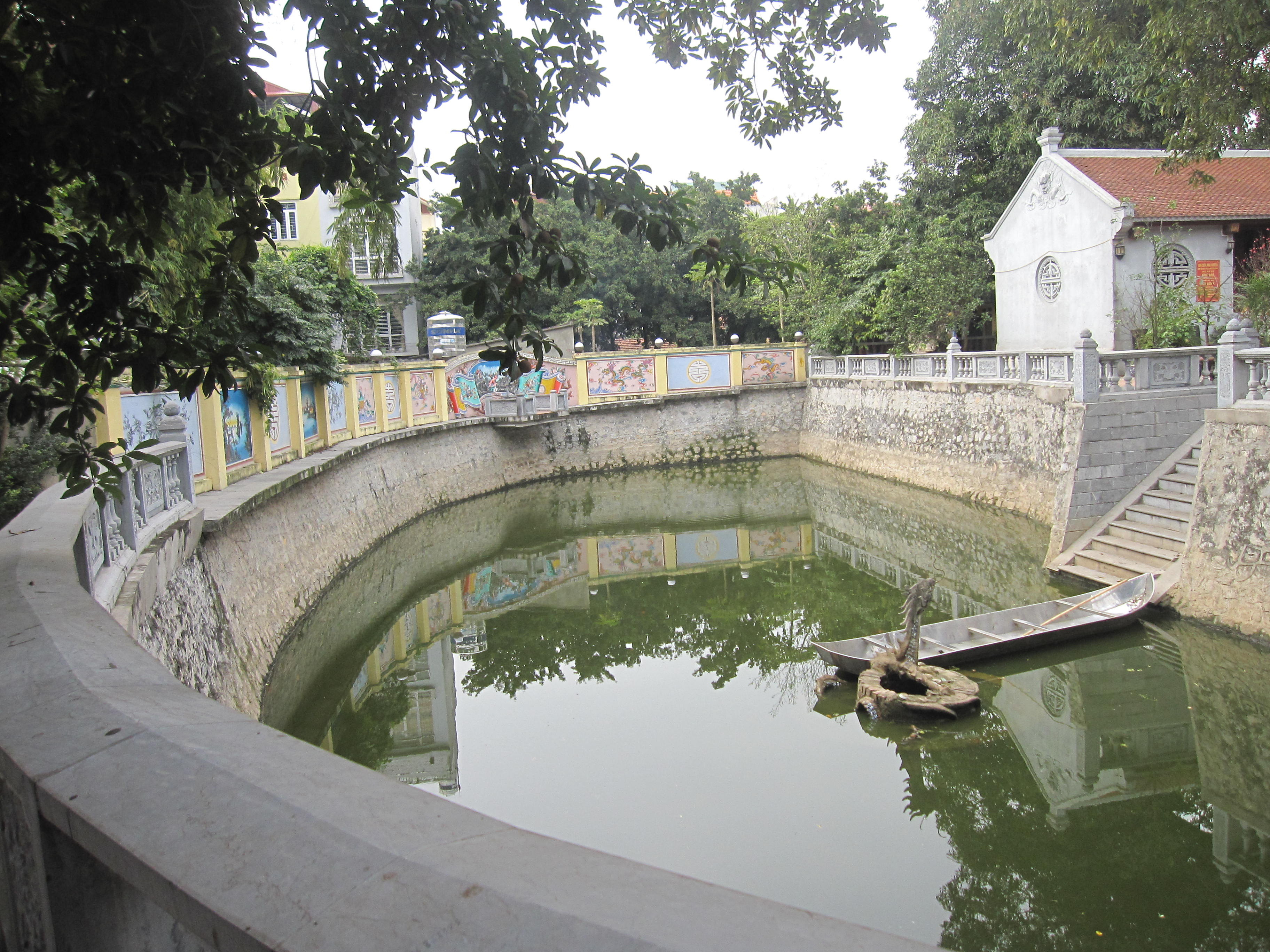 Hồ bán nguyệt trong khuôn viên chùa Khai Nguyên, phường Xuân La, quận Tây Hồ, Hà Nội, Việt Nam